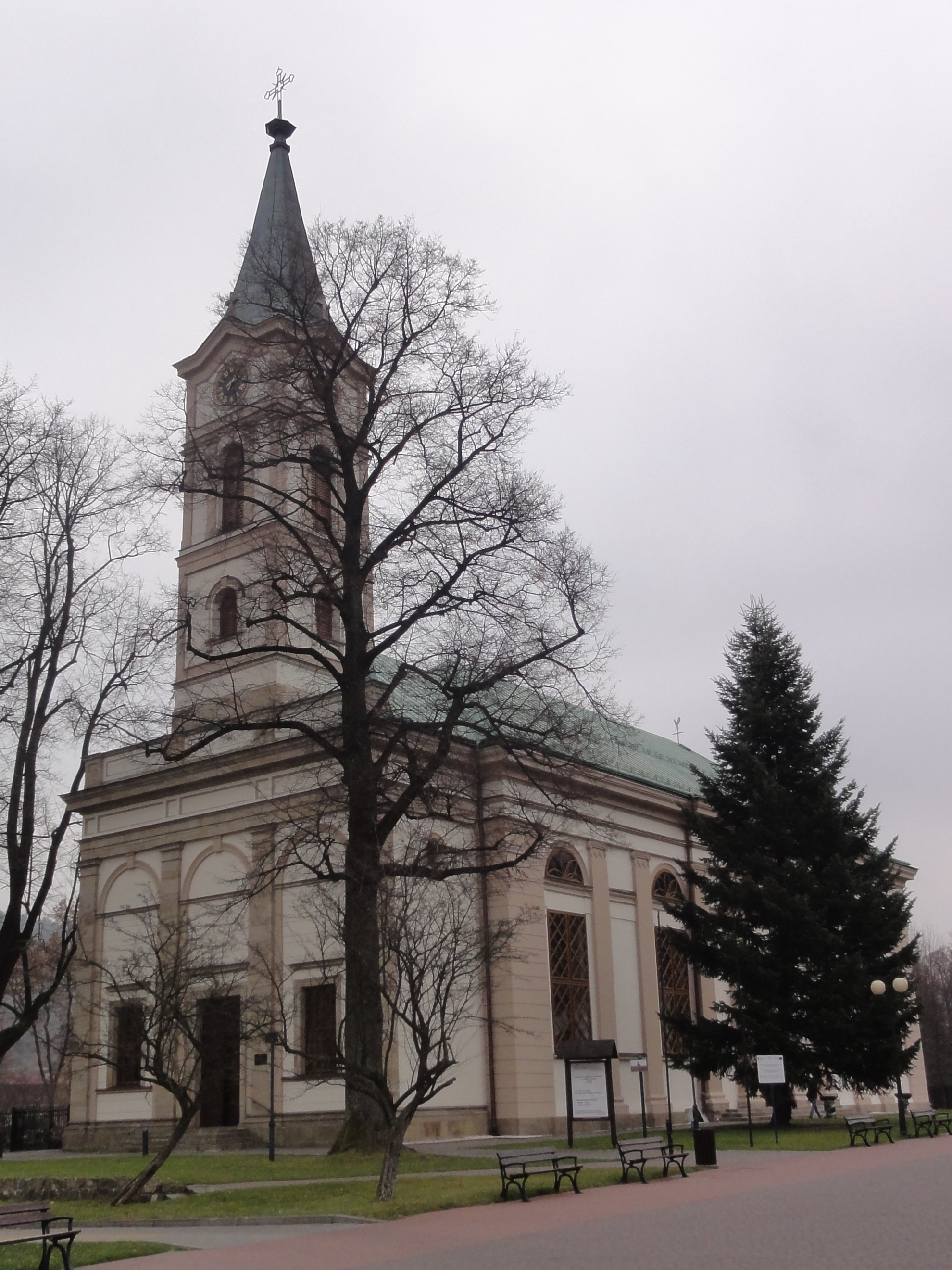 Kościół ewangelicki Apostołów Piotra i Pawła w Wiśle